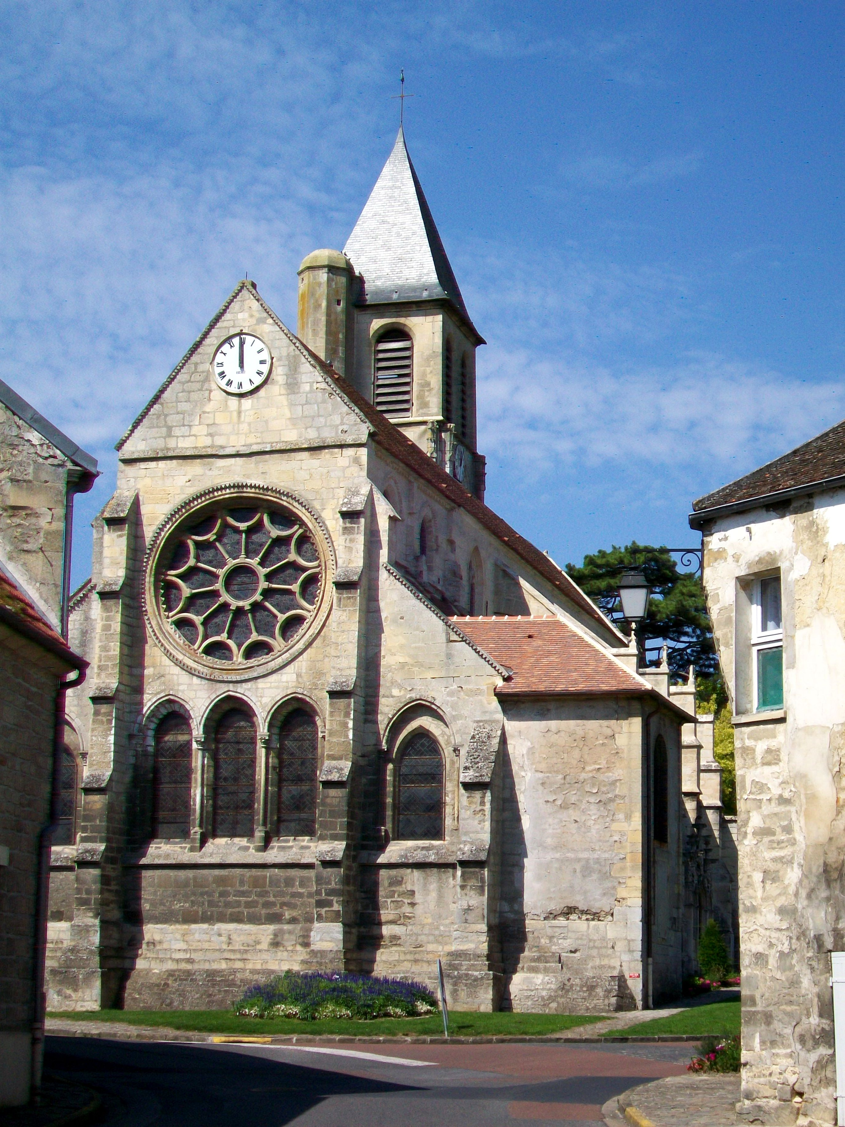 Vue du chevet.